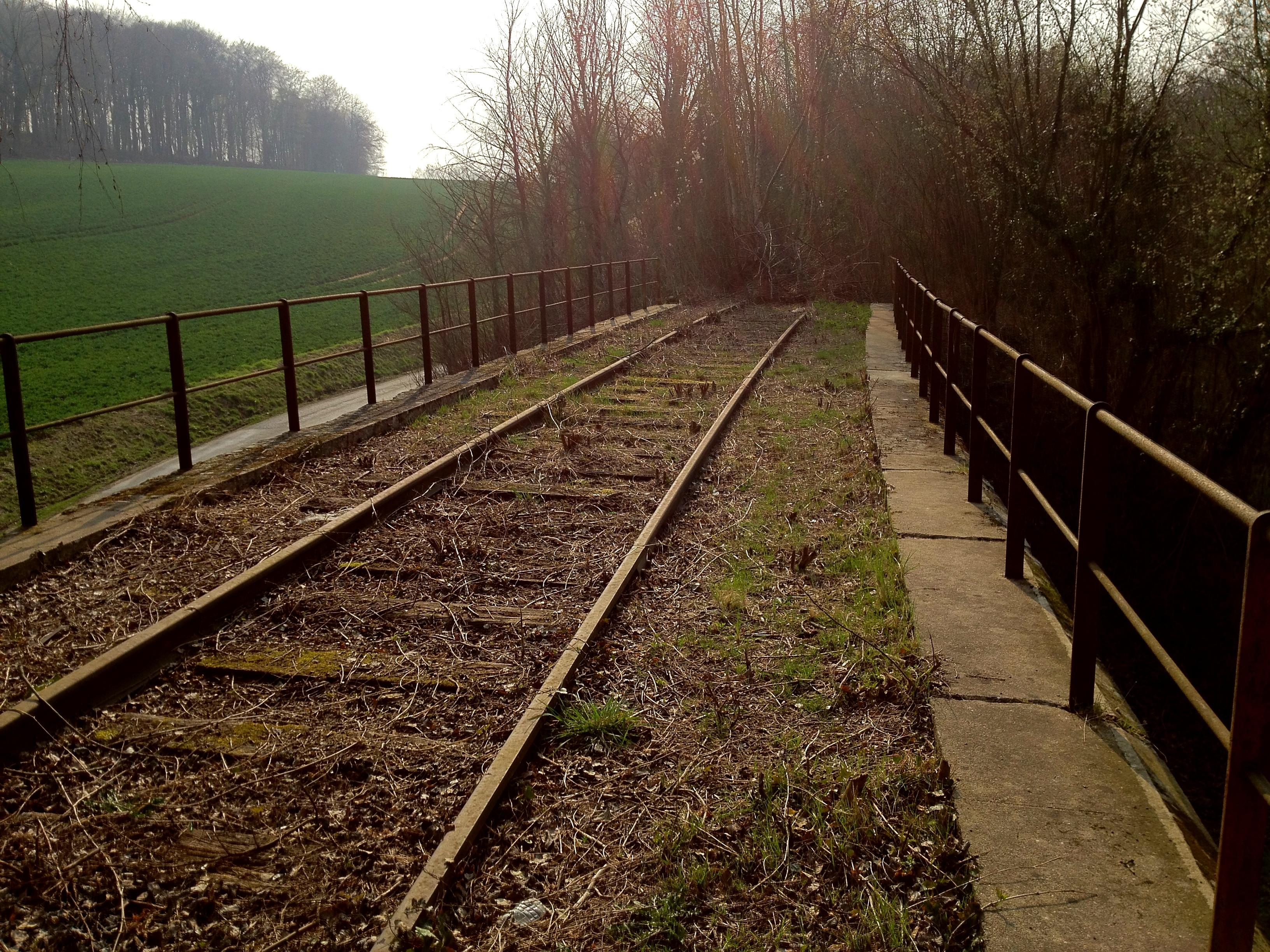 Un pont rail sur la ligne de Chauny à St Gobain à la sortie du village de Barisis.Unknown rail-bridge on the old train-line from chauny to saint gobain (france)